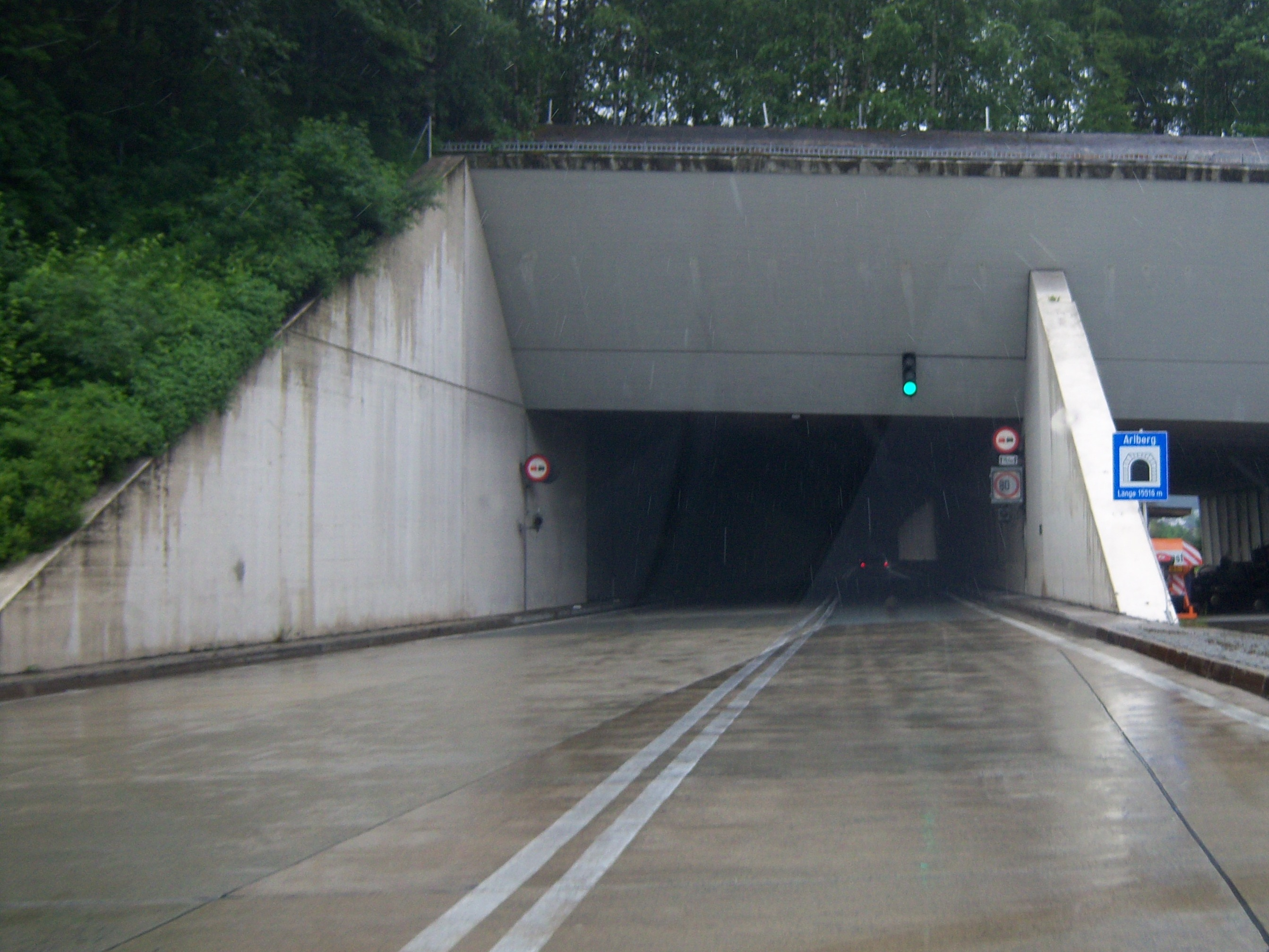 Arlberg Schnellstraße S16 Richtung Bregenz vor dem Arlbergtunnel